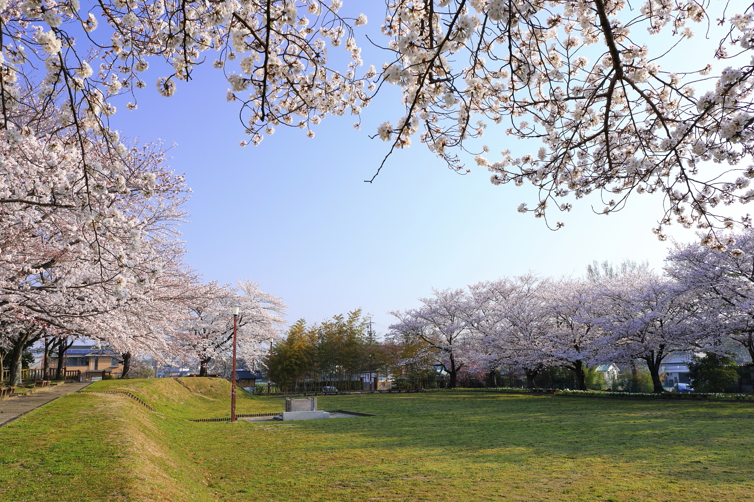 沓掛城址-本丸跡（豊明市沓掛町東本郷、2018年（平成30年）3月）